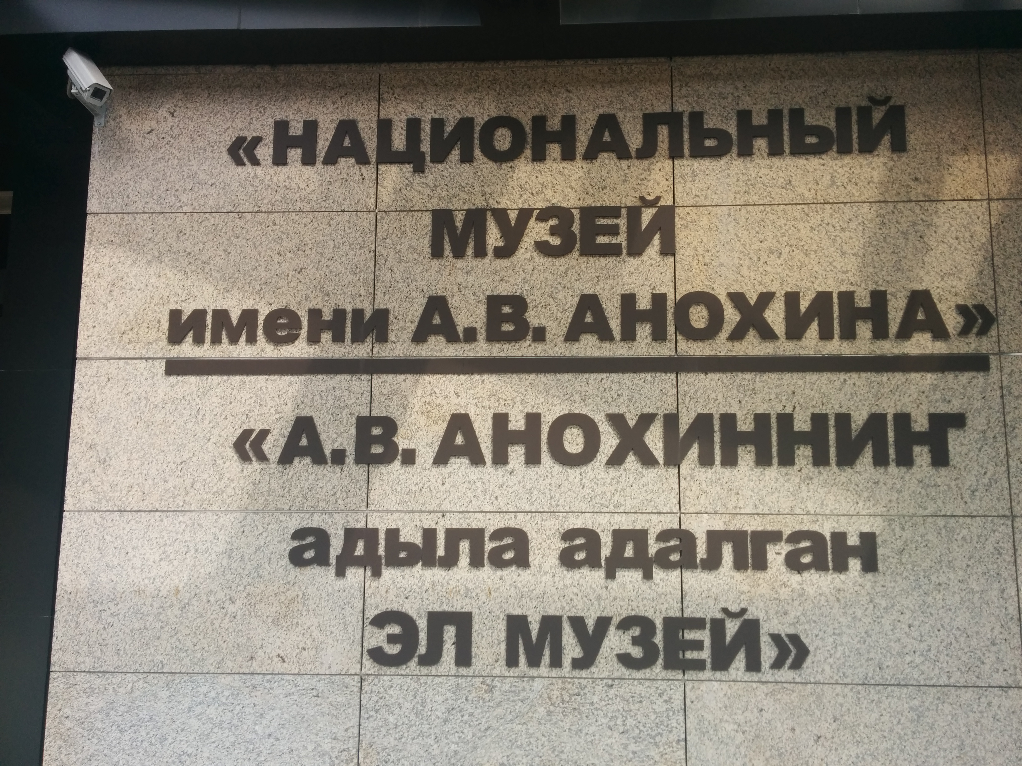 Тыва дыл: Алтай Республиканың Чоннуң музейи